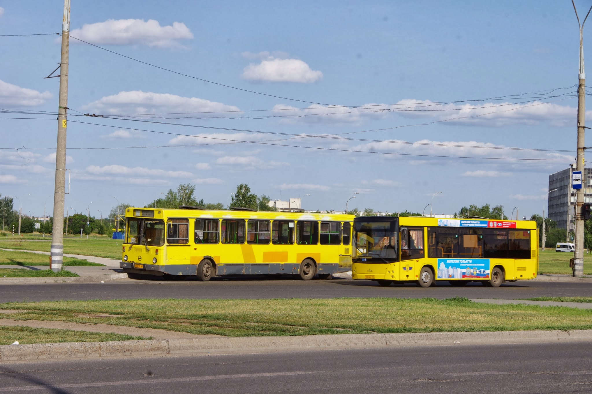 Avtozavodskiy rayon, Tolyatti, Samarskaya oblast', Russia